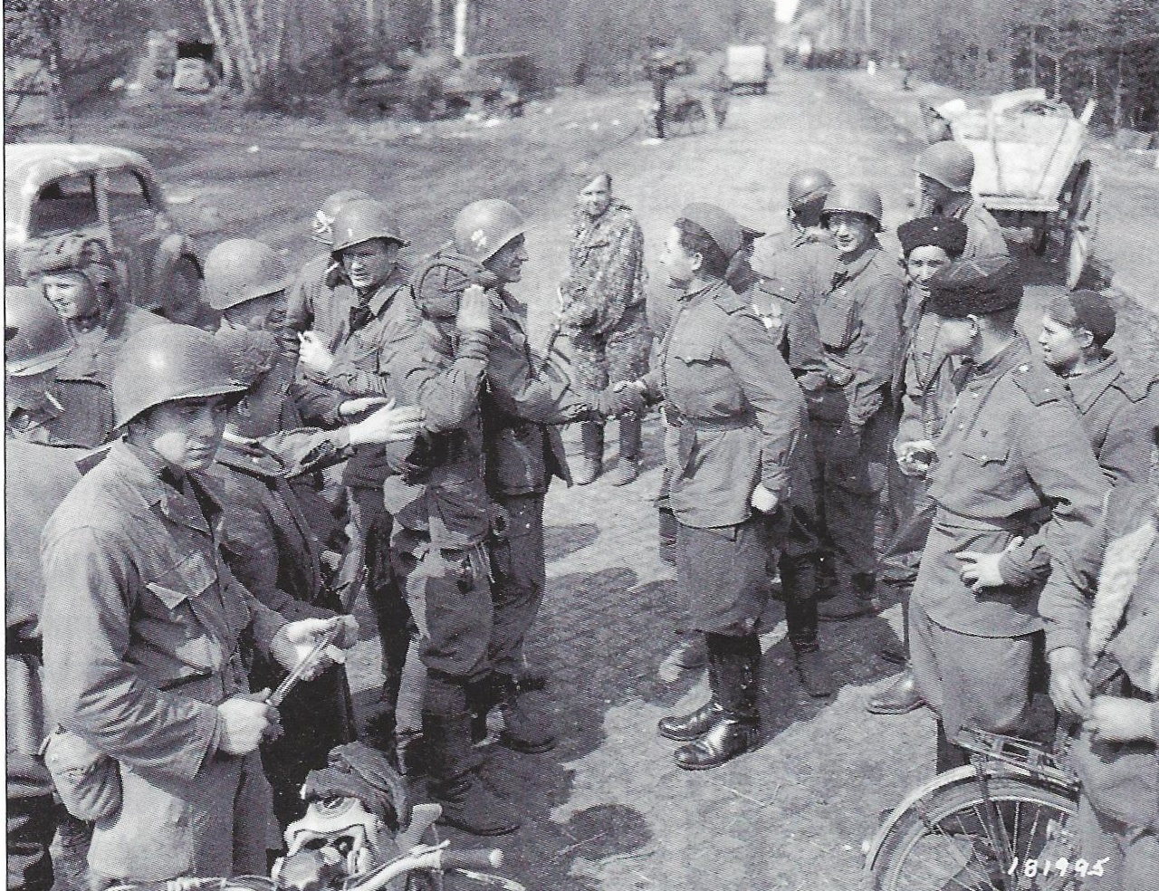 Begegnung russischer und US-amerikanischer Soldaten bei Grabow (Elde)